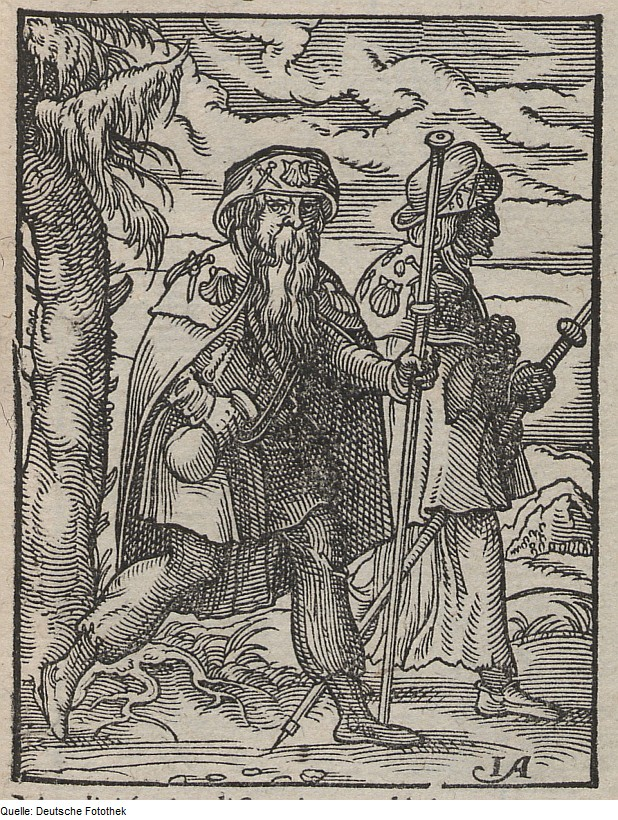 Original image description from the Deutsche Fotothek Ständebuch & Jakobsbruder & Jakobspilger & Pilger & Jakobsmuschel & Wallfahrt